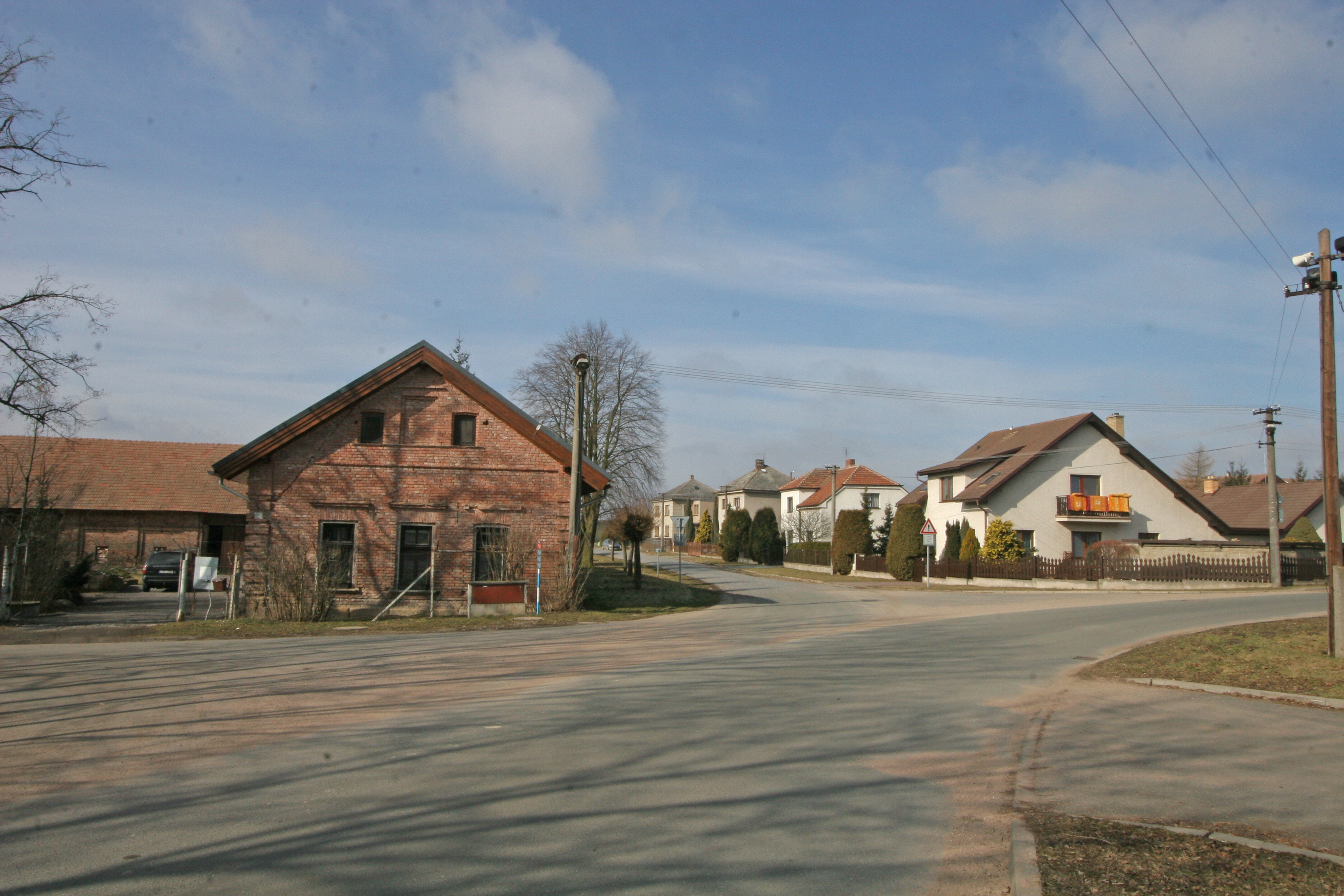 Sedlice čp. 12 a 61